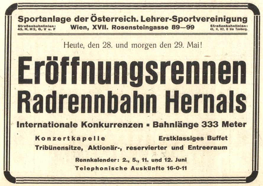 Werbeanzeige im Österreichischen Illustrierten Sportblatt vom 28. Mai 1921 mit dem Text „[...] Heute, den 28. und morgen den 29. Mai! Eröffnungsrennen Radrennbahn Hernals [...]“ ...